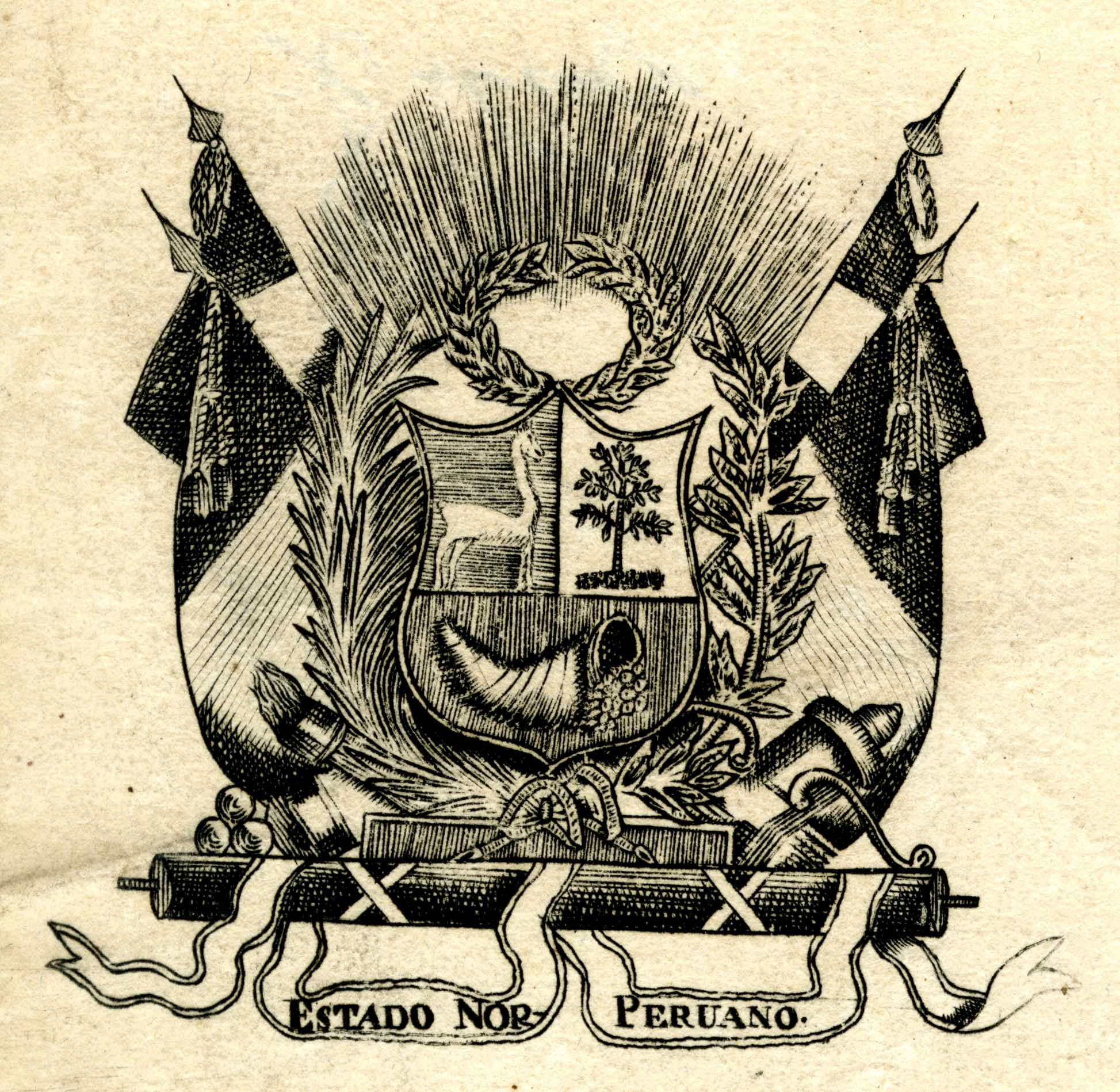 Imagen que representa el Escudo del Estado Peruano del Norte (Actual República del Perú) durante la existencia de la Confederación Peruano-Boliviana. Diapositiva de Consulta hallada en el Fondo Documental Número 337 del Archivo Histórico del Guayas, Guayaquil - Ecuador.